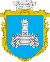 Герб Хмільника